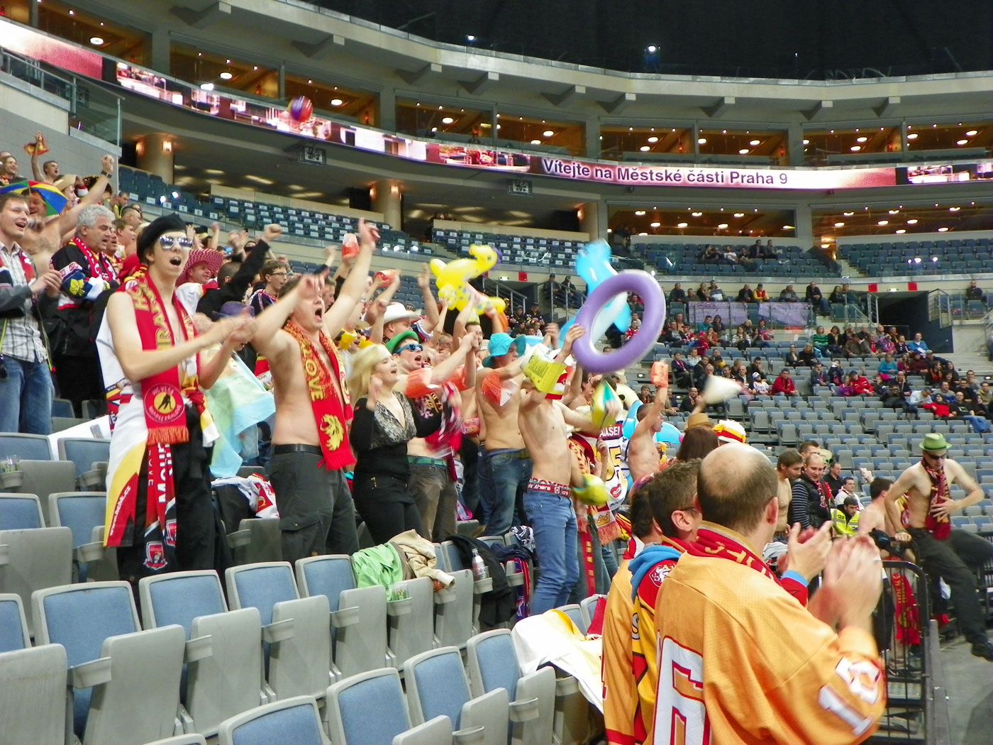 Fanoušci Hradce Králové na utkání Slavia - MHK